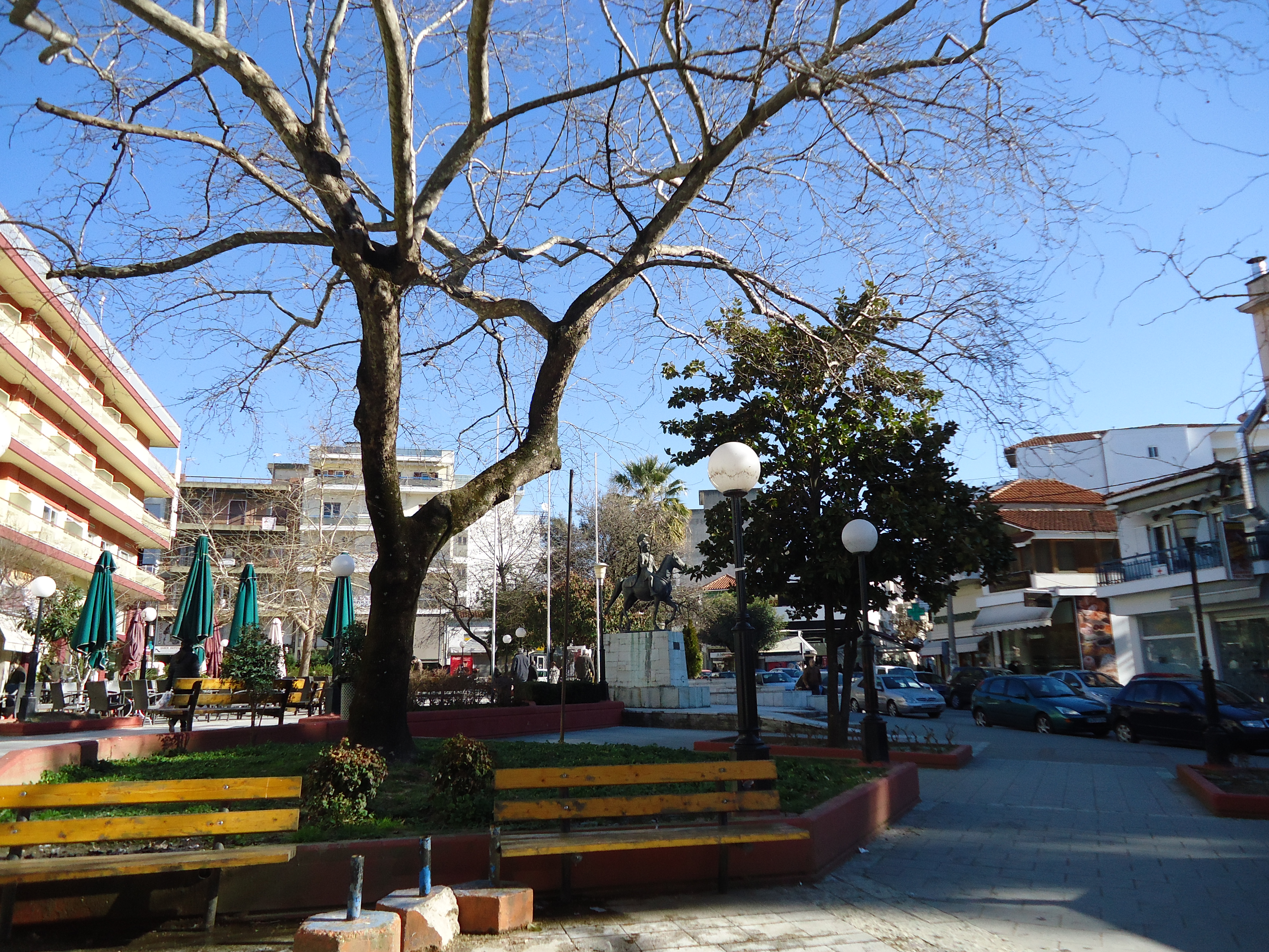 Πλατεία Κιλκίς στην Άρτα, η οποία ονομάστηκε έτσι προς τιμήν του Θωρηκτού Κιλκίς, το οποίο έλαβε μέρος στον Α΄ Παγκόσμιο Πόλεμο.